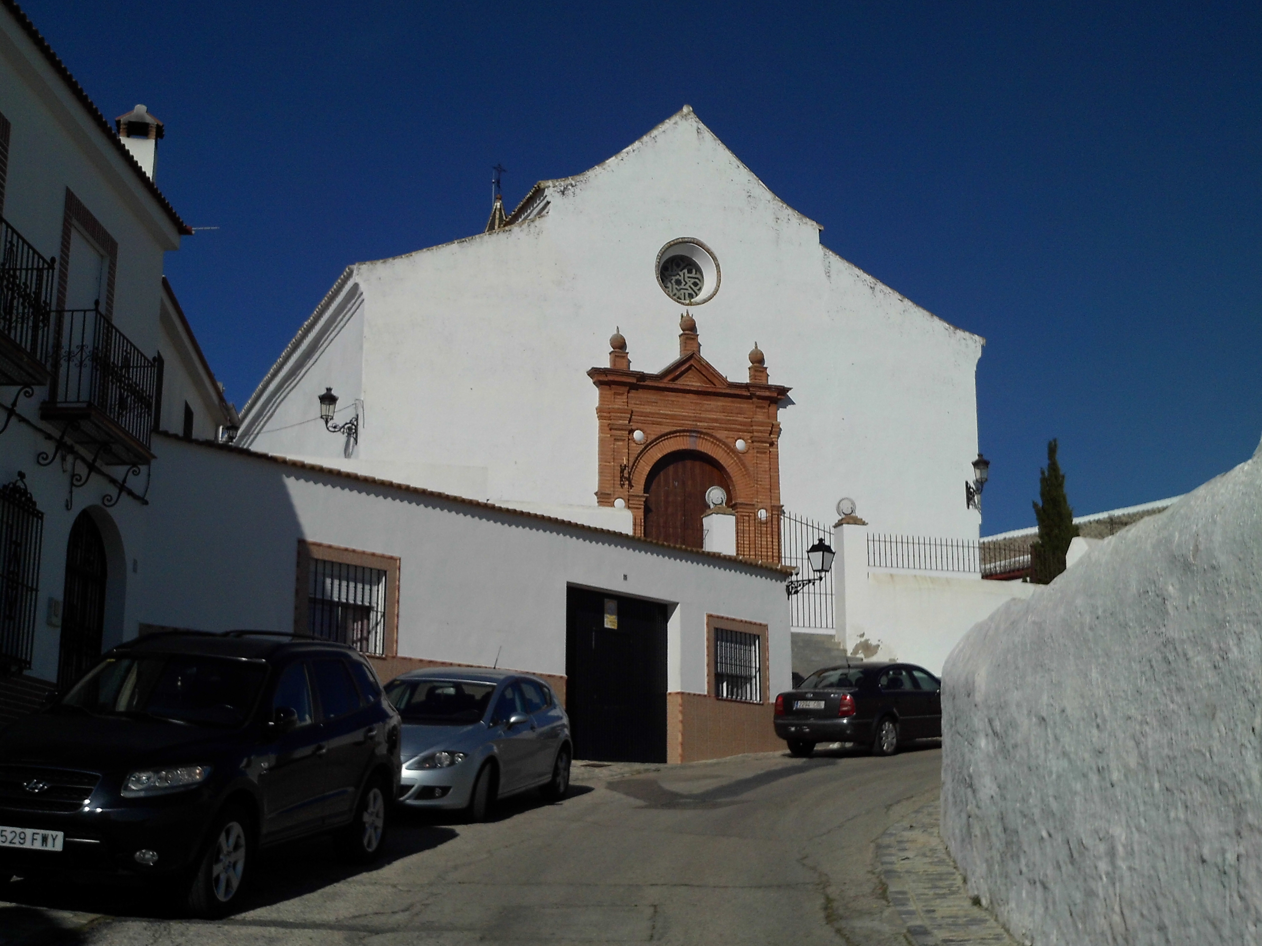 Iglesia de la Purísima Concepción. Gerena, provincia de Sevilla, Andalucía, España.